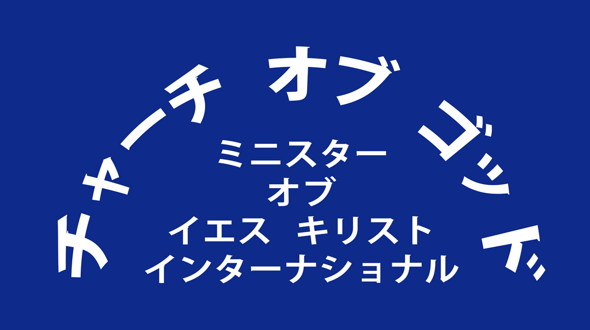 チャーチ・オブ・ゴッド・ミニスター・オブ・イエス・キリスト・インターナショナル Logo